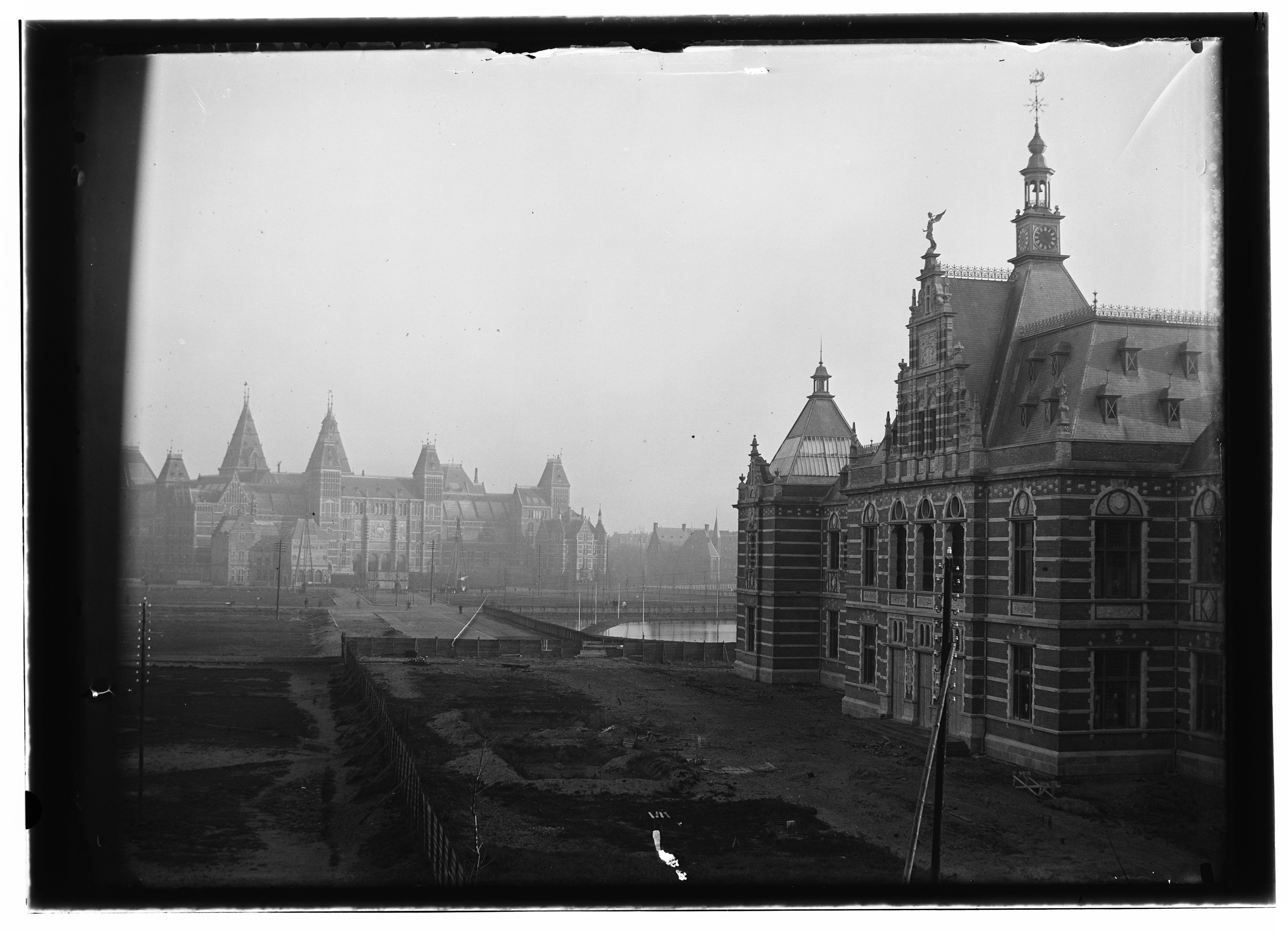 Beschrijving Paulus Potterstraat 13 (rechts) Gezicht op het nieuwe Museum Suasso (Stedelijk Museum) (arch. A.W. Weissman)``, gezien vanuit Van Baerlestraat 50 naar achterzijde Rijksmuseum (arch. P.J.H.Cuypers) en Hobbemastraat. Serie: Canon Amsterdam Vondelpark en Museumplein Documenttype foto Vervaardiger Olie``, Jacob (1834-1905) Collectie Collectie Jacob Olie Jbz. Datering 28 november 1894 Geografische naam Paulus Potterstraat Inventarissen Afbeeldingsbestand 10019A000837 Generated with Dememorixer